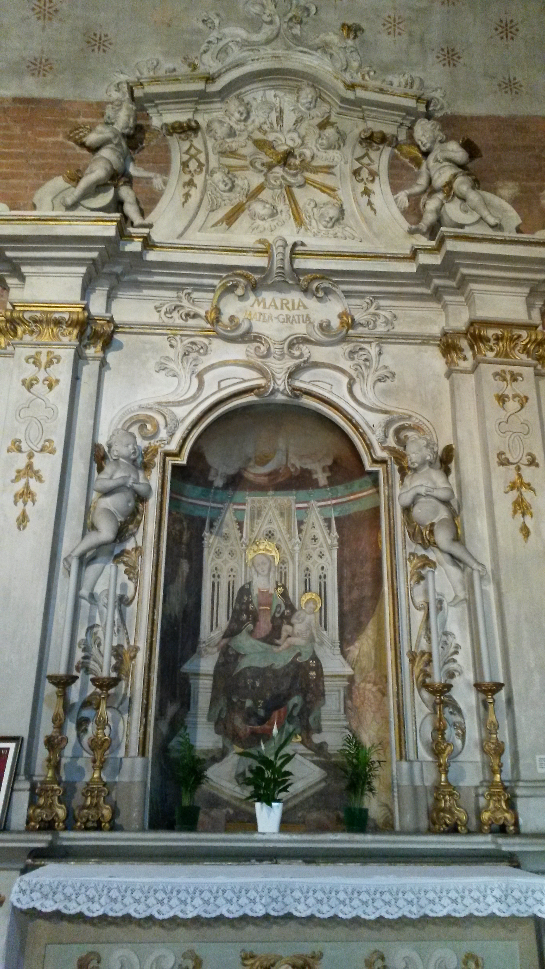 Monastero romanico di San Lanfranco (Pavia) Madonna in Trono di epoca tardogotica attribuita agli Zavattari